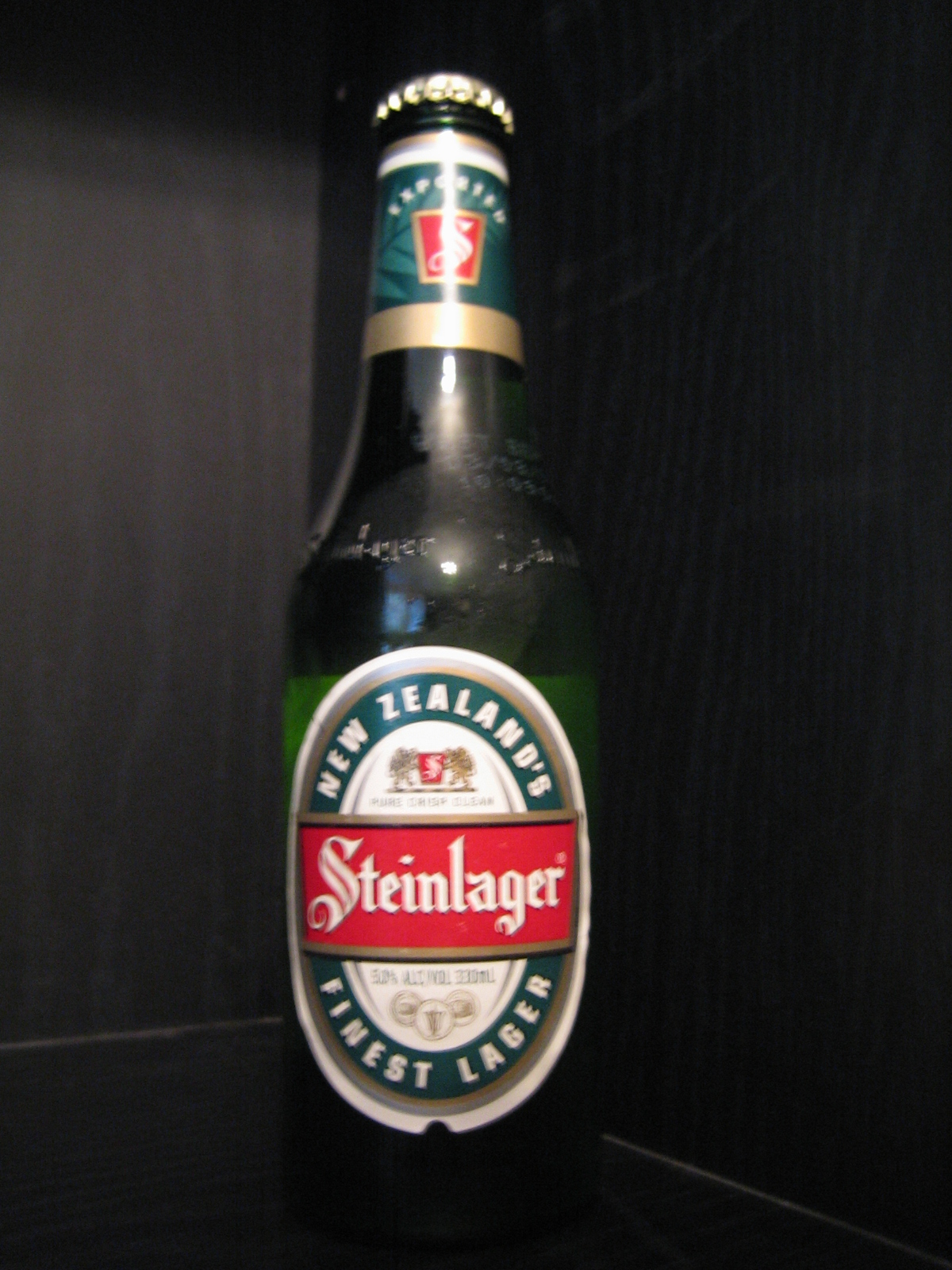 Photo d'une bouteille de bière Steinlager (Photo personnel 2006) Utilisateur:FRED